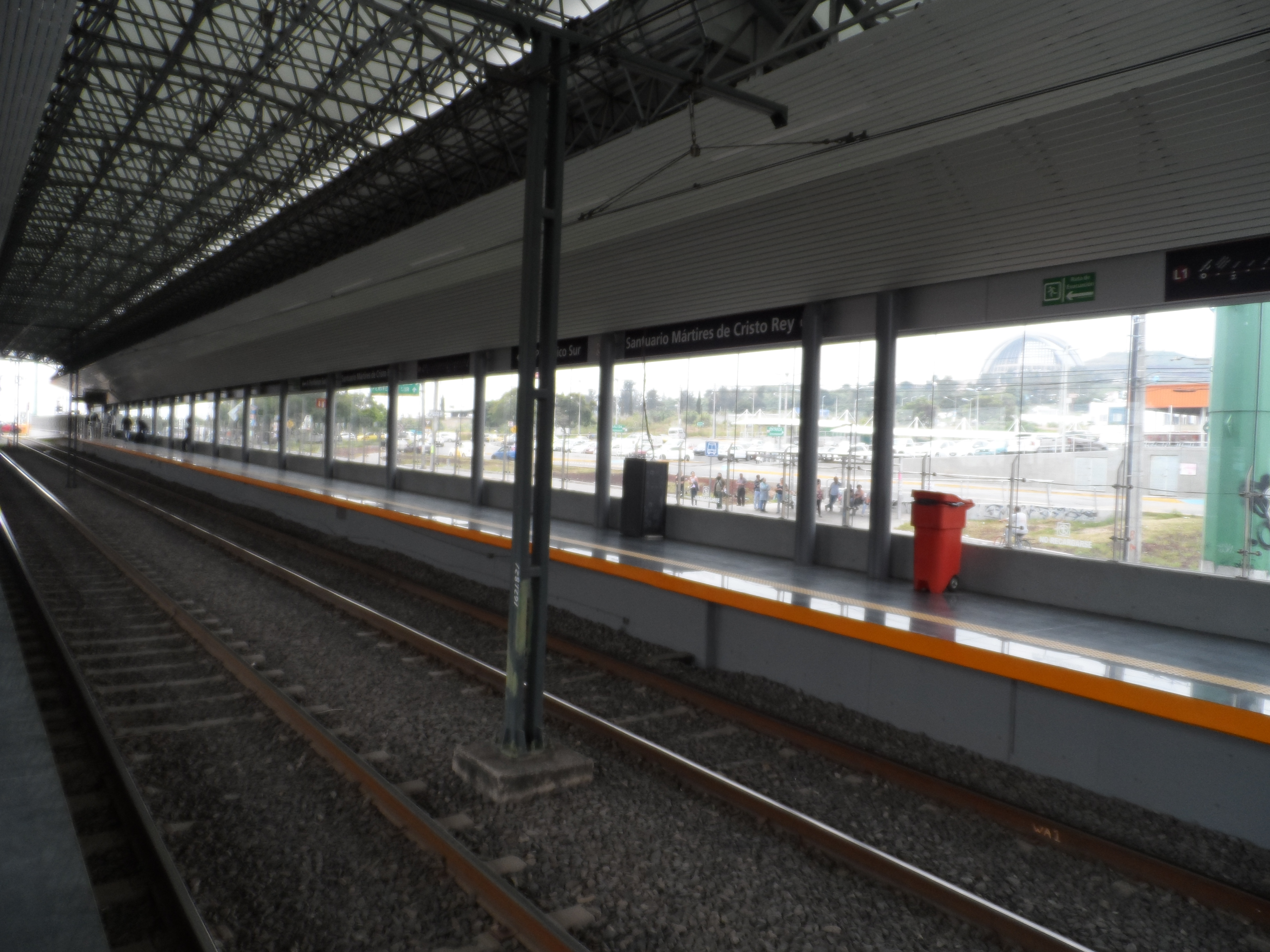 Andenes de la estación "Santuario Mártires de Cristo Rey" de la Línea 1 del Tren Ligero de Guadalajara.